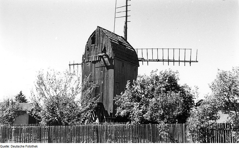 Original image description from the Deutsche Fotothek Uhrsleben. Bockmühle, Baujahr 1835